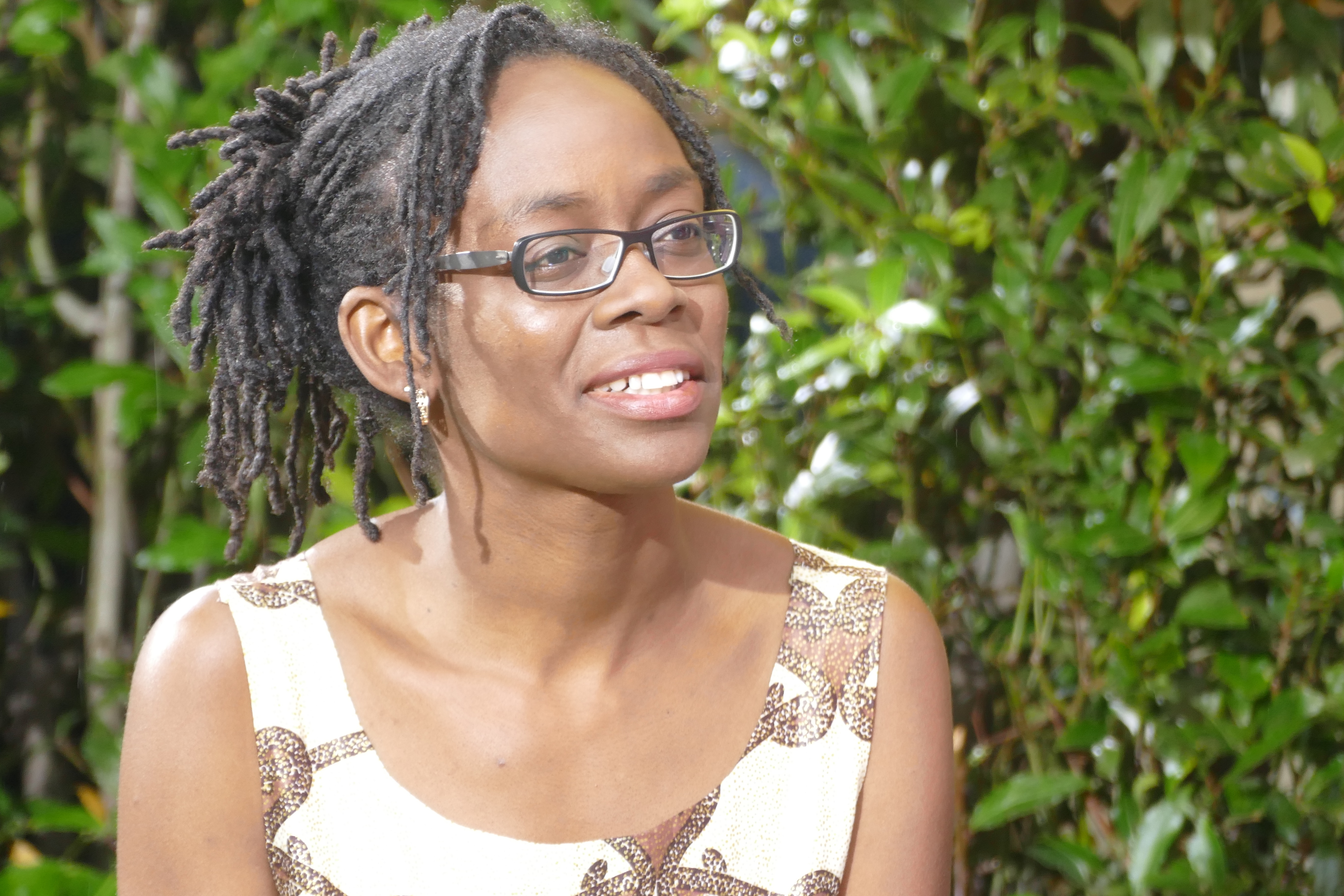 Sharon Dodua Otoo beim Interview im Garten des ORF-Theaters nach dem Gewinn des Bachmannpreises 2016